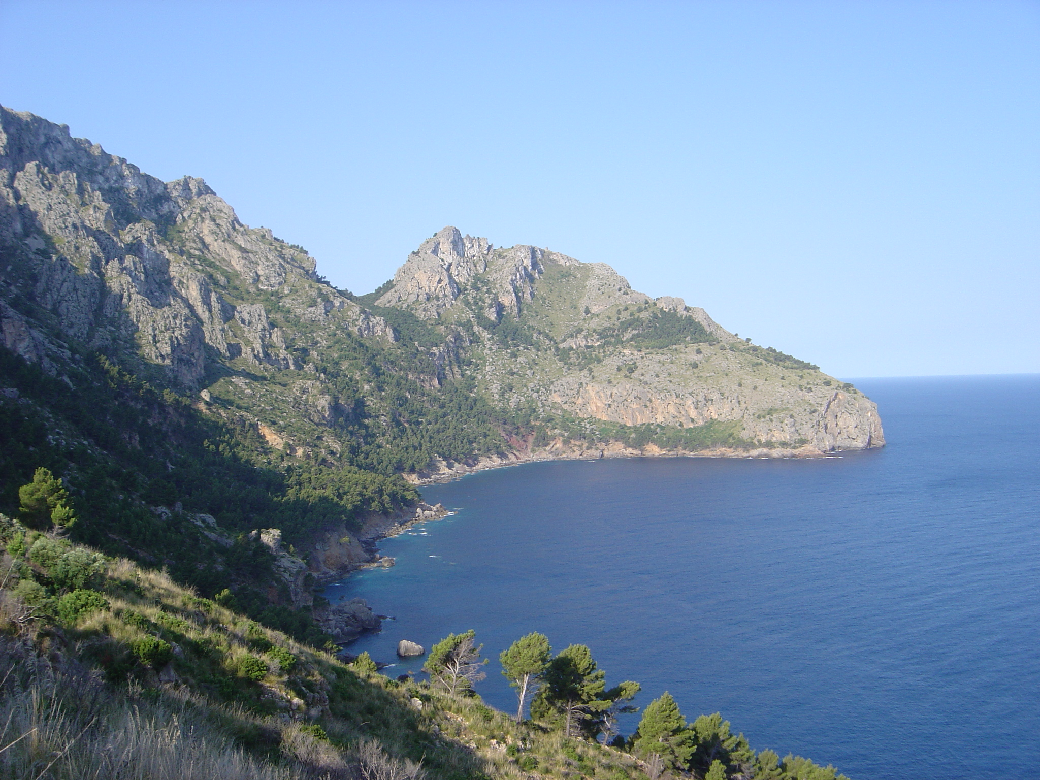 Sa Costera. Escorca. Mallorca.